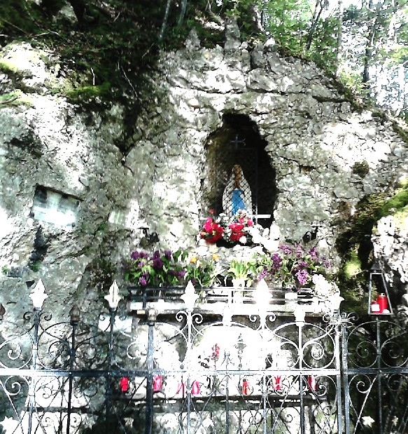 Marien-Grotte in Immenstadt Stadtteil Rauhenzell-Egg